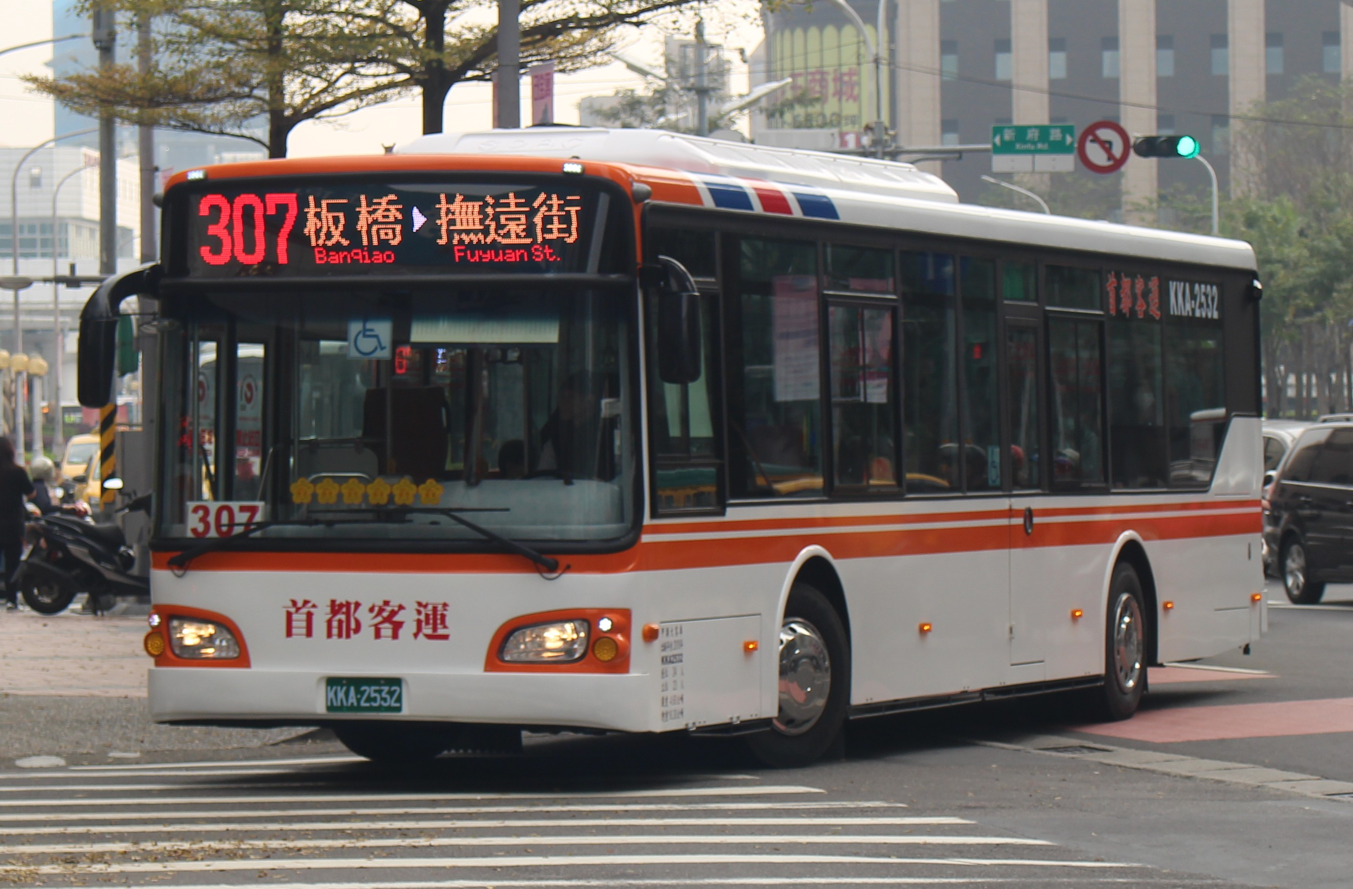 首都客運2018年日野HS8JRVL-UTF大客車KKA-2532。